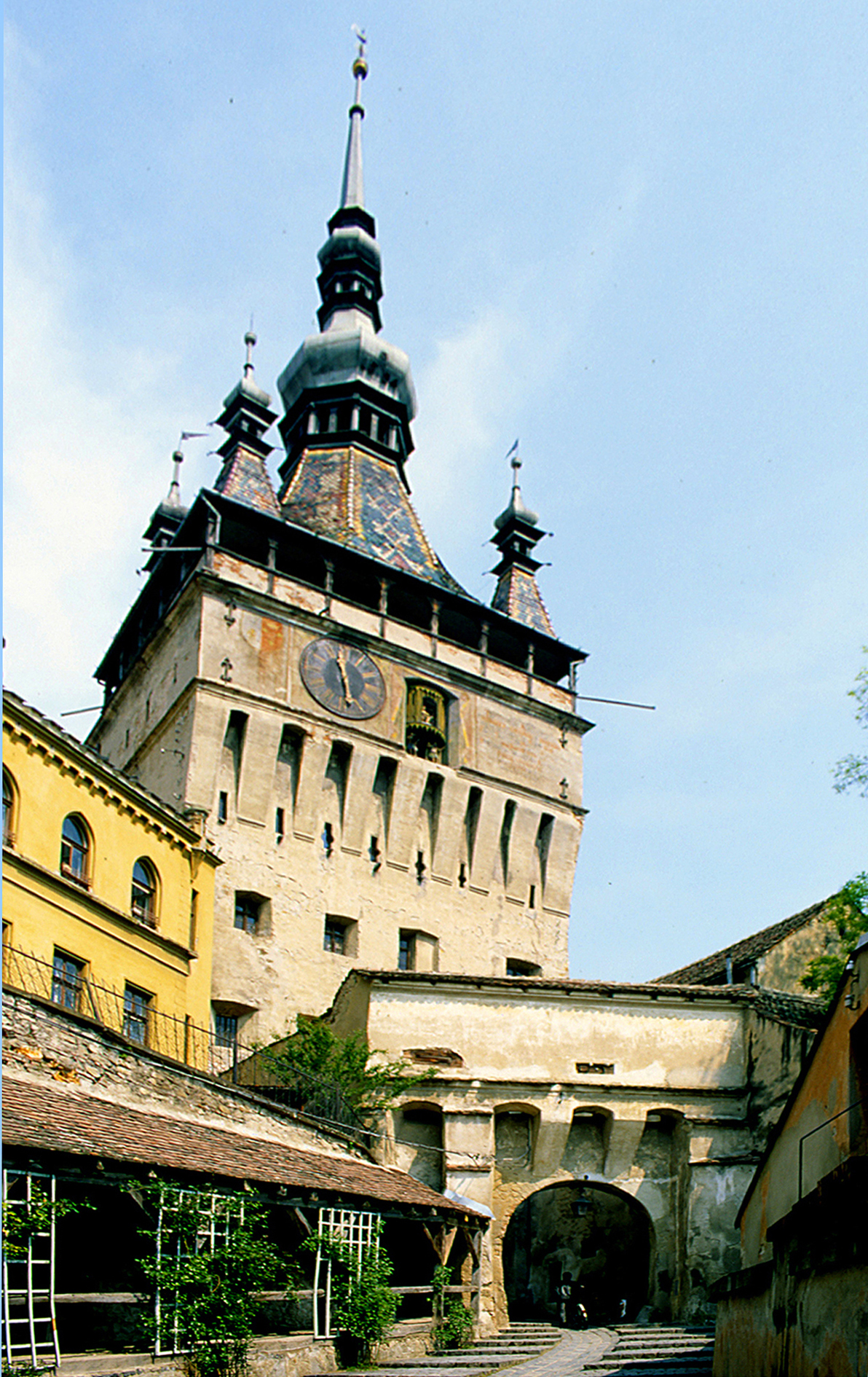 Schäßburg – Burgtor und Stundturm.